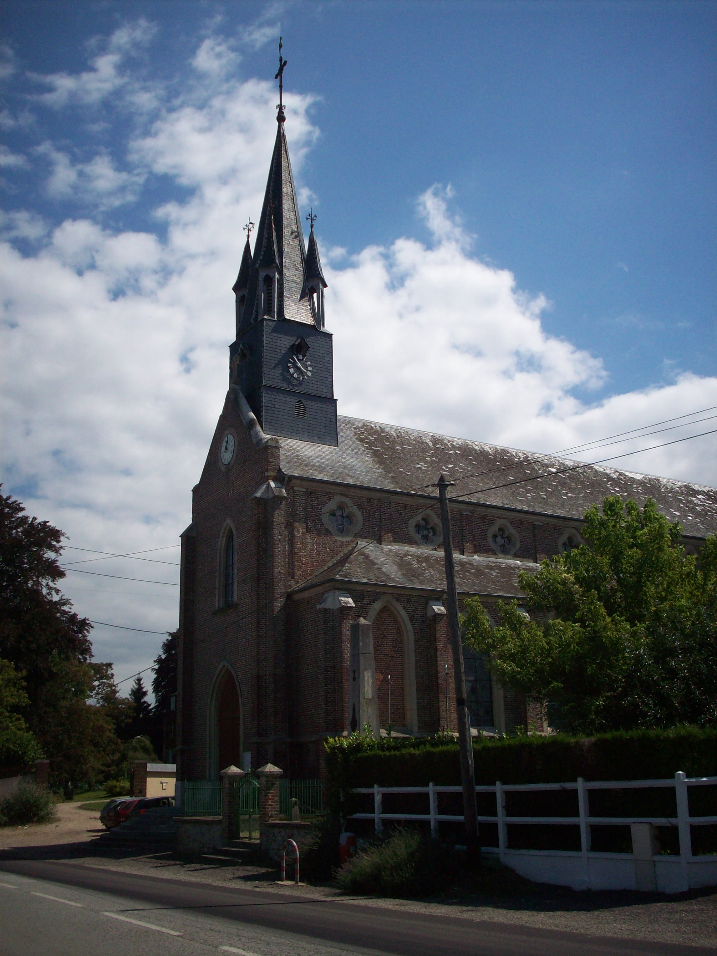 Vue de l'église de l'Assomption à Douville-sur-Andelle